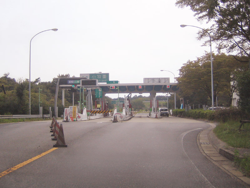 Komaki-higashi Interchange (小牧東インターチェンジ), Aichi, Japan